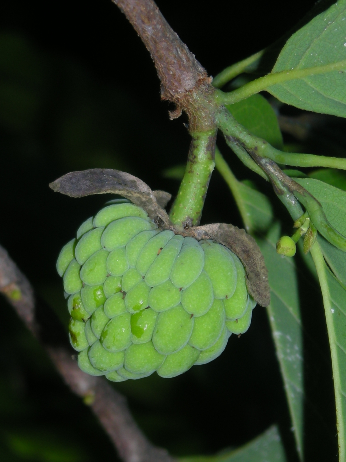 Sugar apple fruit